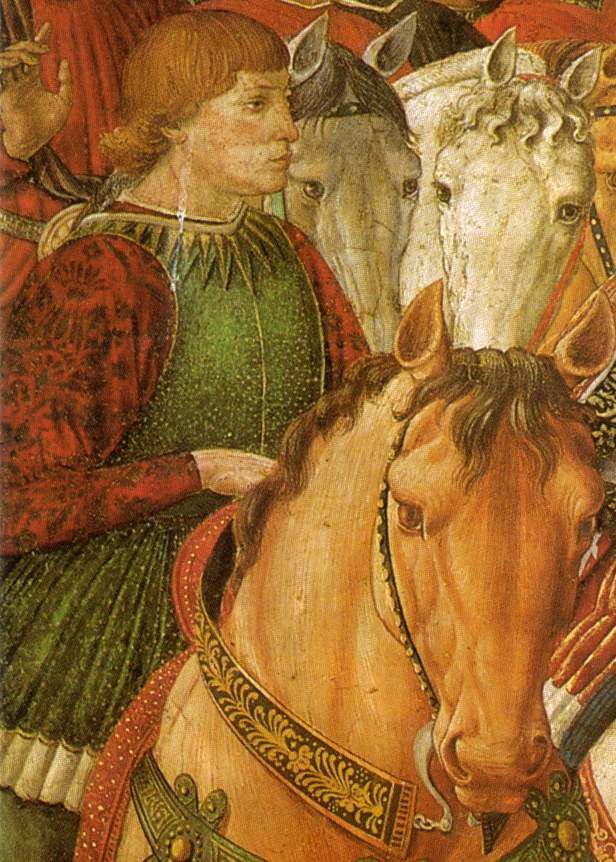 Sigismondo Malatesta. Detail from the fresco by Benozzo Gozzoli, in the "Cappella dei Magi", at Palazzo Medici Riccardi in Florence, Italy.